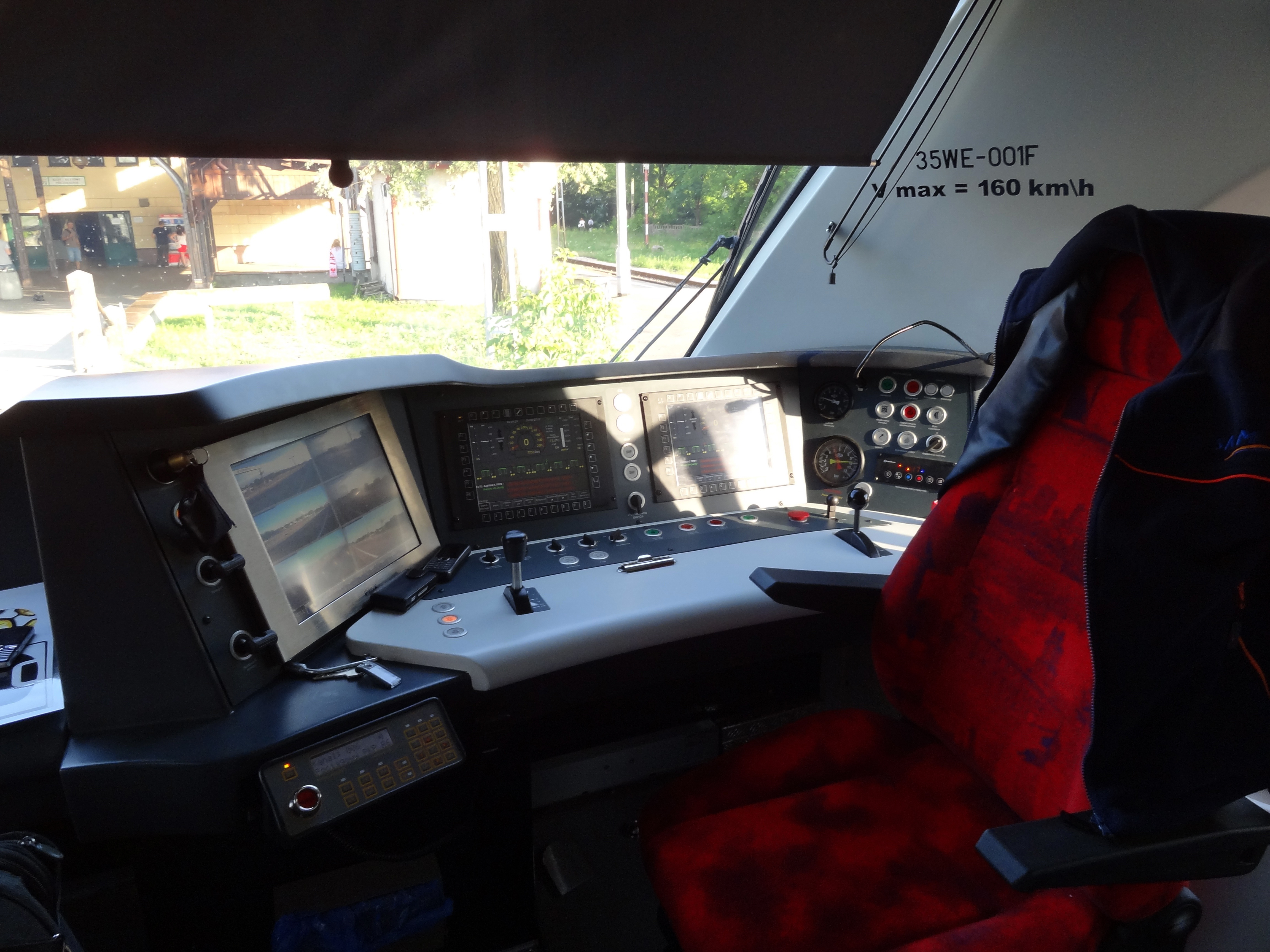 35WE-001 "Impuls" - na stacji Otwock - jeden z pierwszych dni kursowania